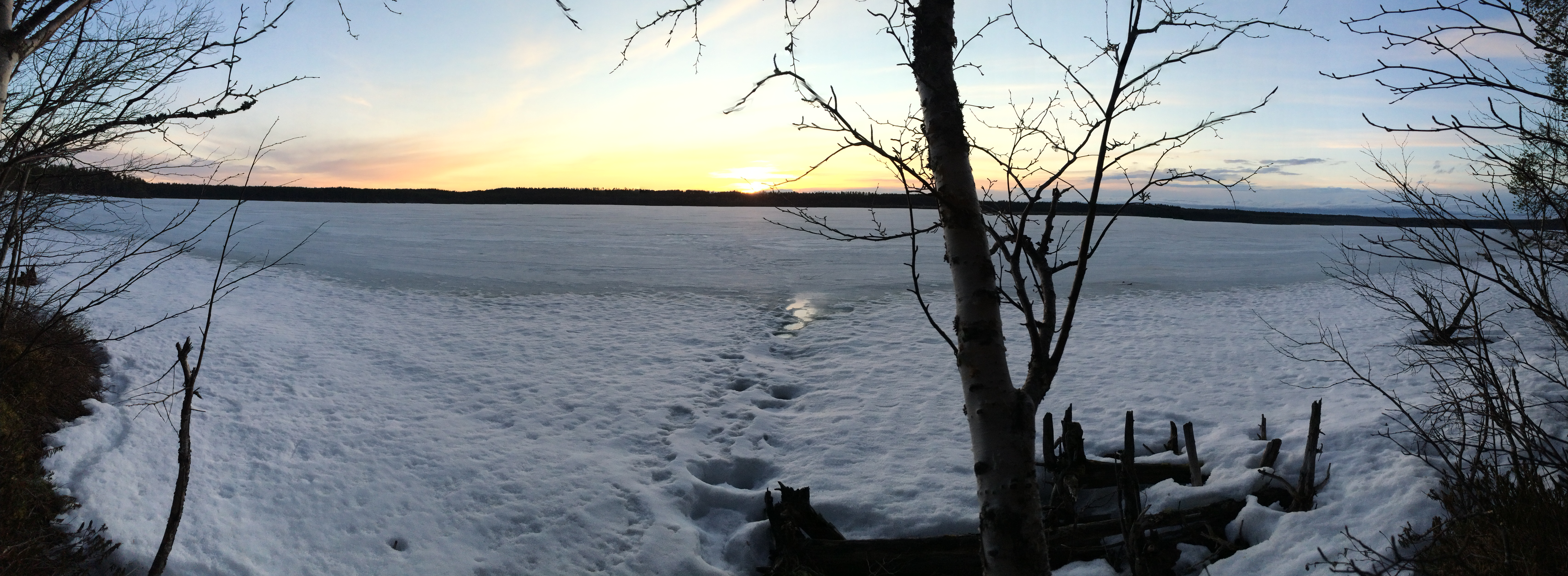 оз Чикша